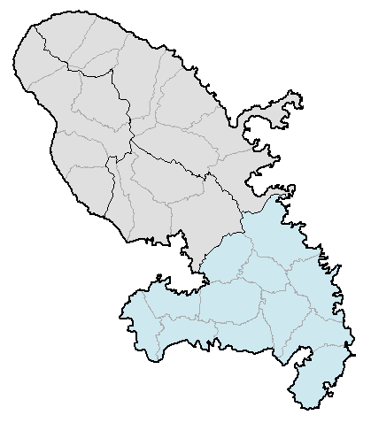 Carte de la Martinique avec l'arrondissement du Marin en couleur. Map of French department of Martinique with Marin "arrondissement" in color.